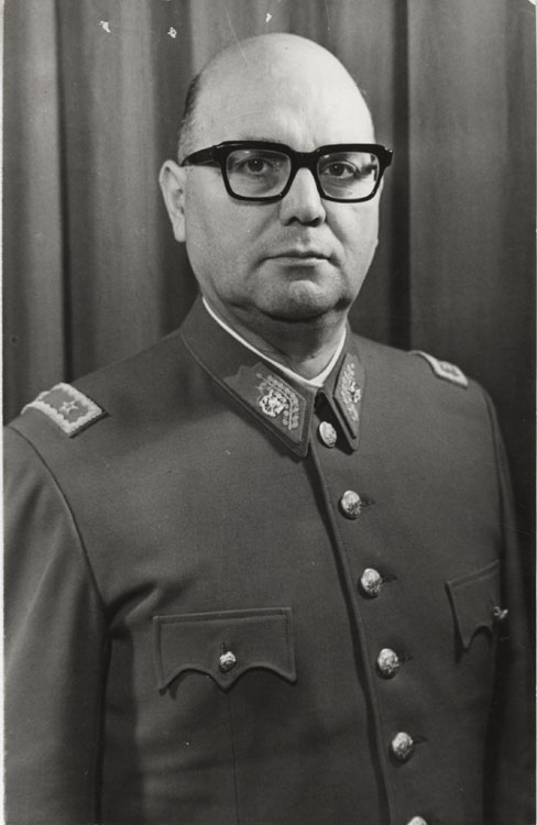 César Raúl Benavides, Ministro del Interior de Chile entre 1974 y 1978.